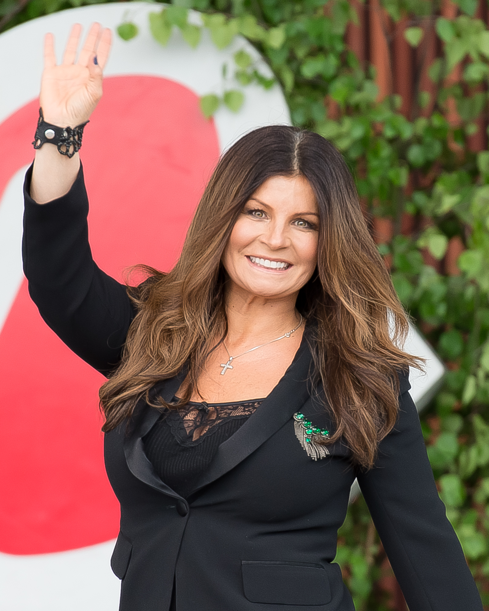 Artisterna för Allsång på Skansen presenteras den 10 juni 2015 på Skansen i Stockholm.